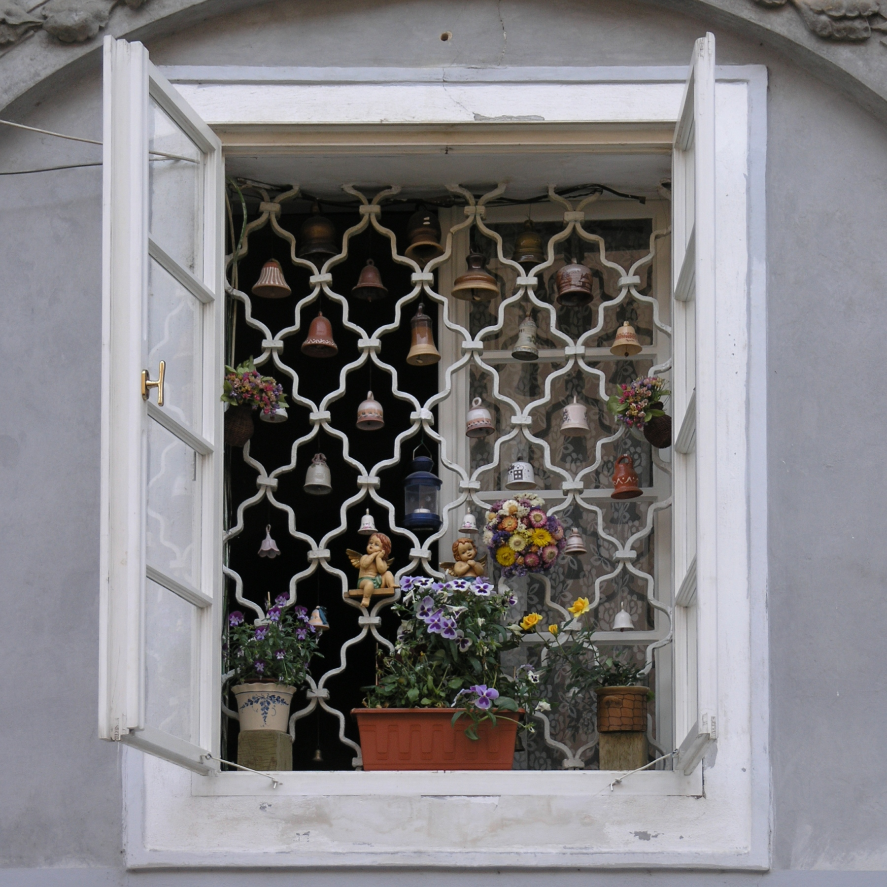 Praha, Malá Strana - Sněmovní 5 (okno vyzdobené zvonky, detail)